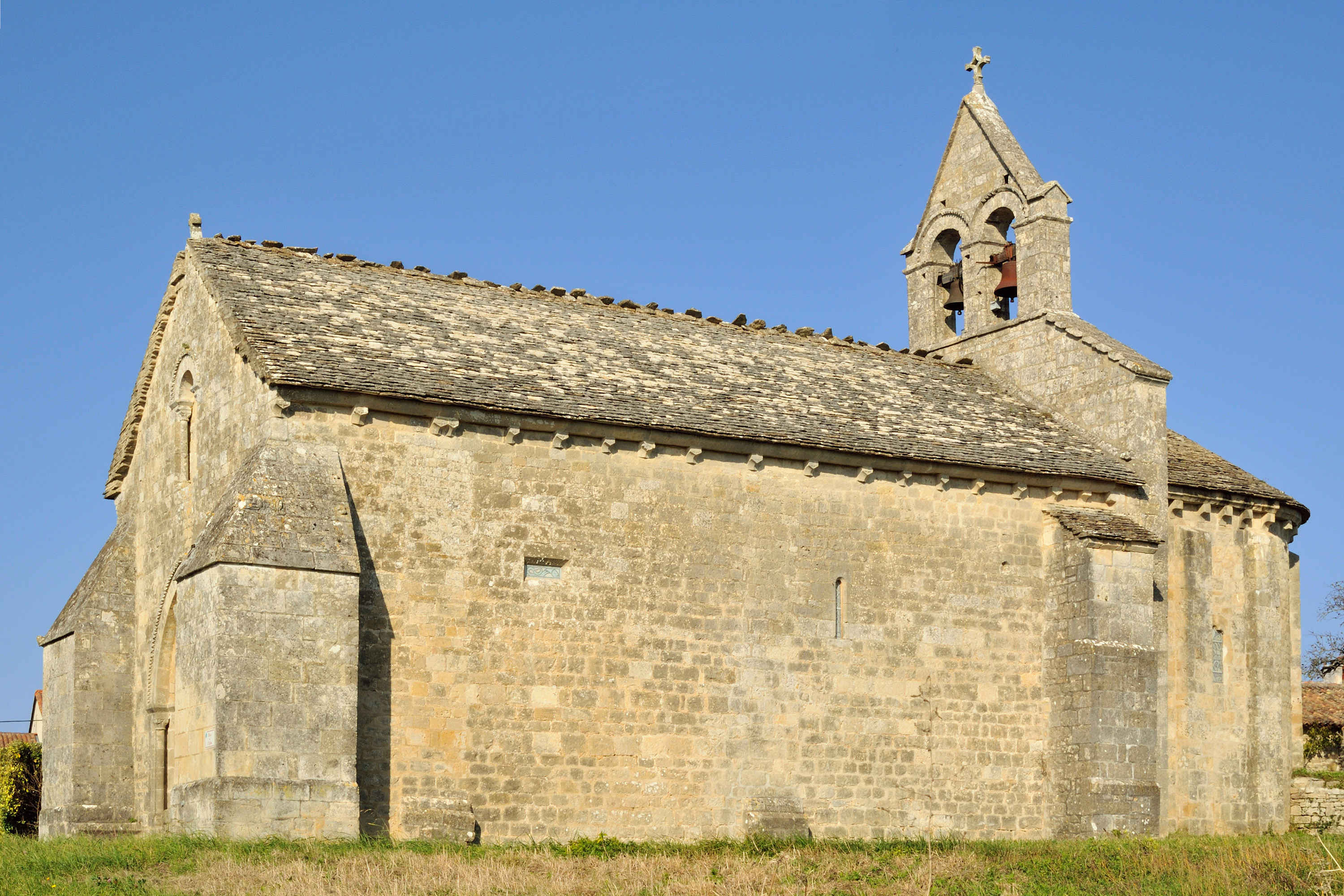 Église Sainte-Radegonde de Theil-Rabier, vue vers le nord